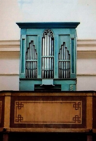 L'organo è attribuito al noto maestro organaro magliese Vincenzo De Micheli ed è databile alla seconda metà del 1800.